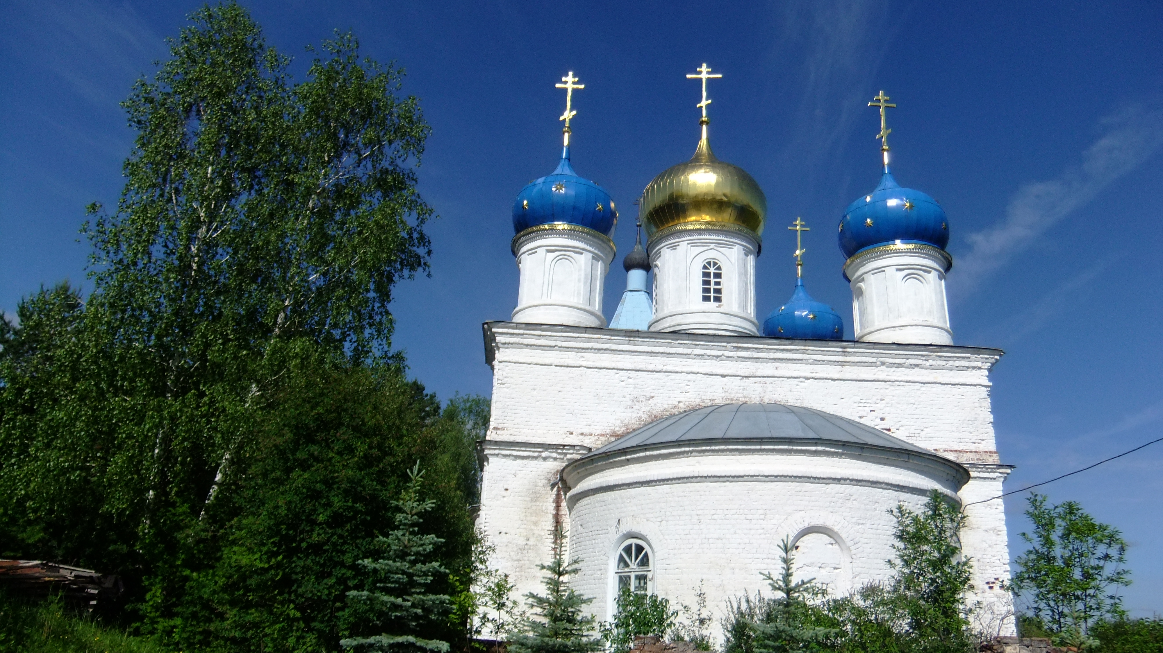 Церковь Владимирcкой иконы Божией Матери (Владимирская область, Муром, село Тучково)